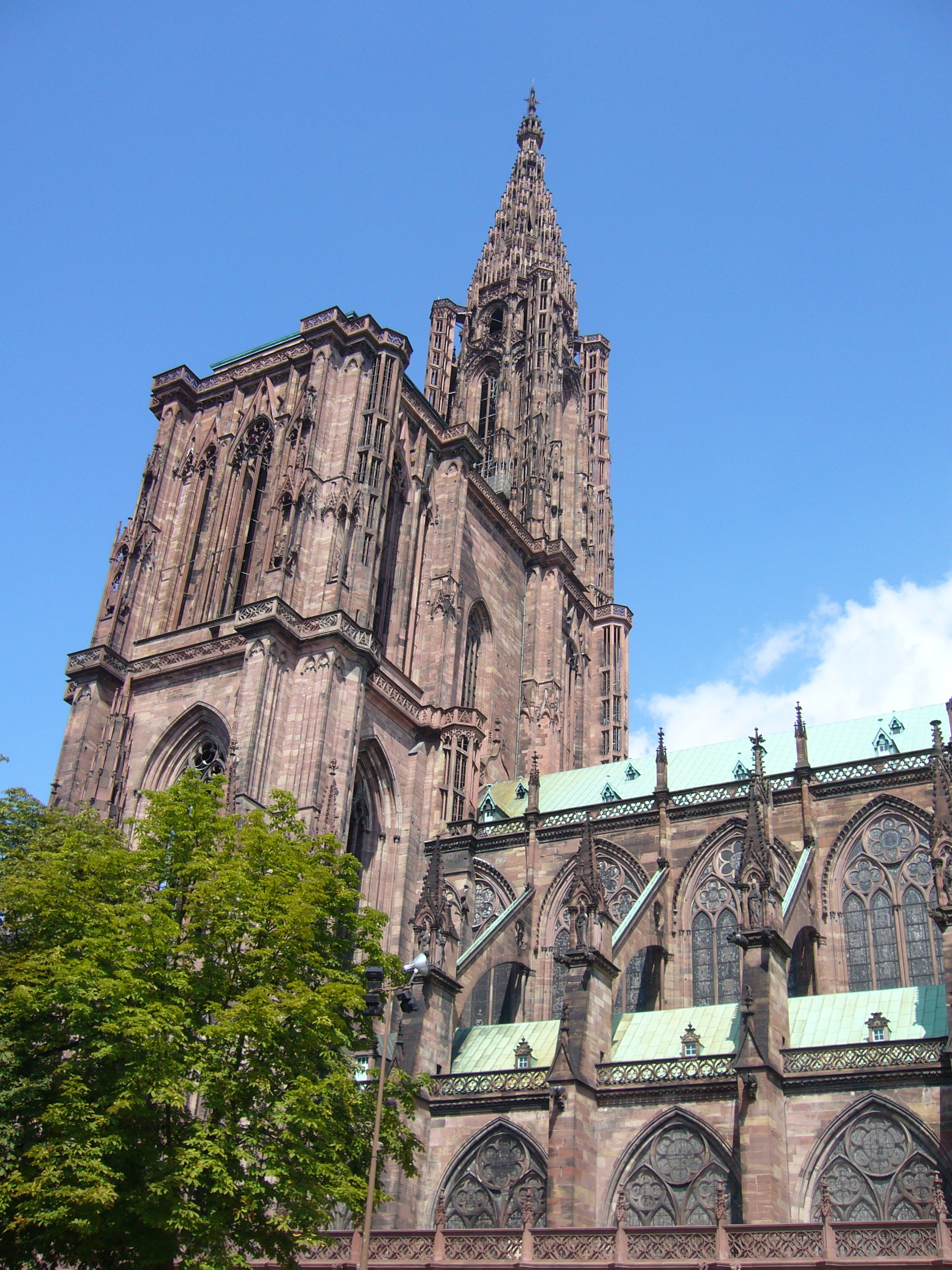 la cathédrale de Strasbourg